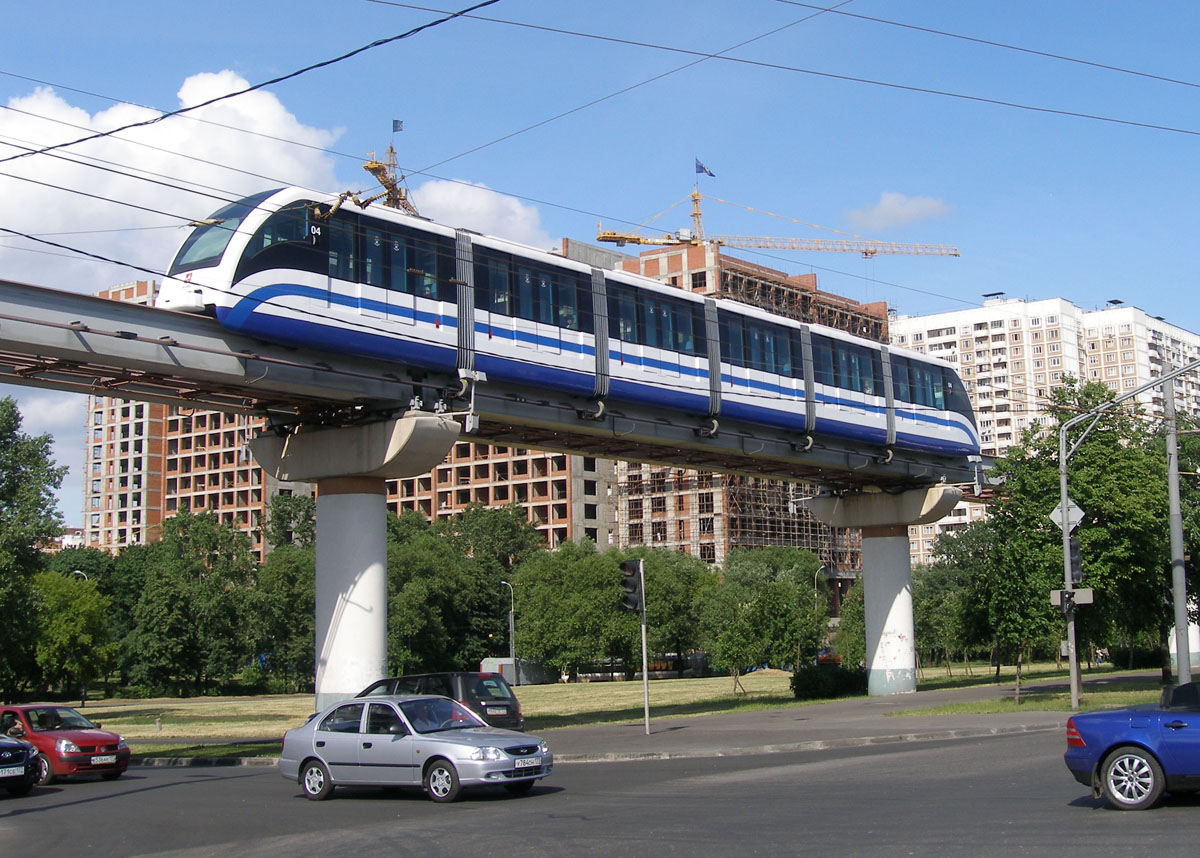 Монорельсовый поезд/Monorail train // На углу Королёва и Новомосковской.